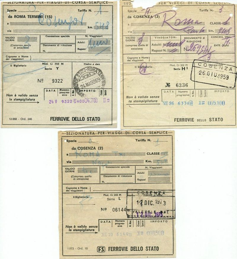 Tre biglietti della ferrovia Paola-Cosenza, datati 24 maggio 1969, 26 giugno 1959 e 12 dicembre 1973